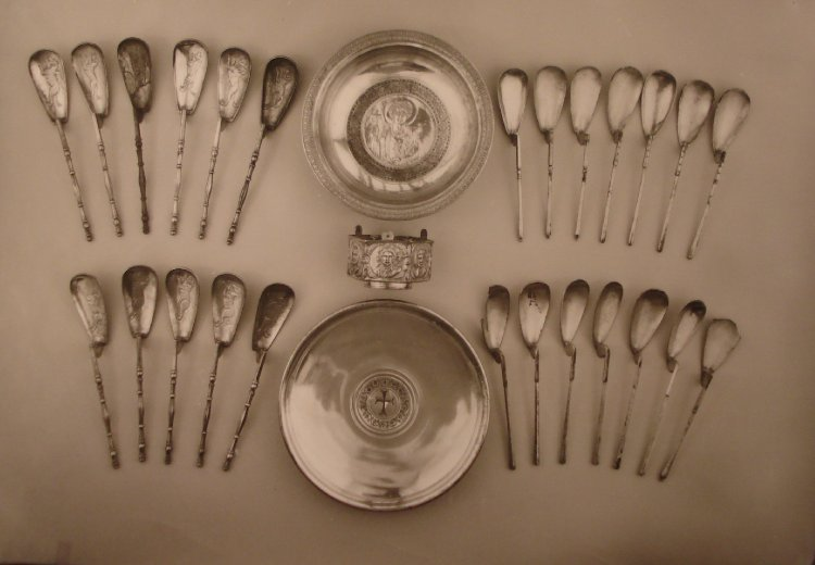 1. Schatzfund von Lambousa (now British Museum, London)